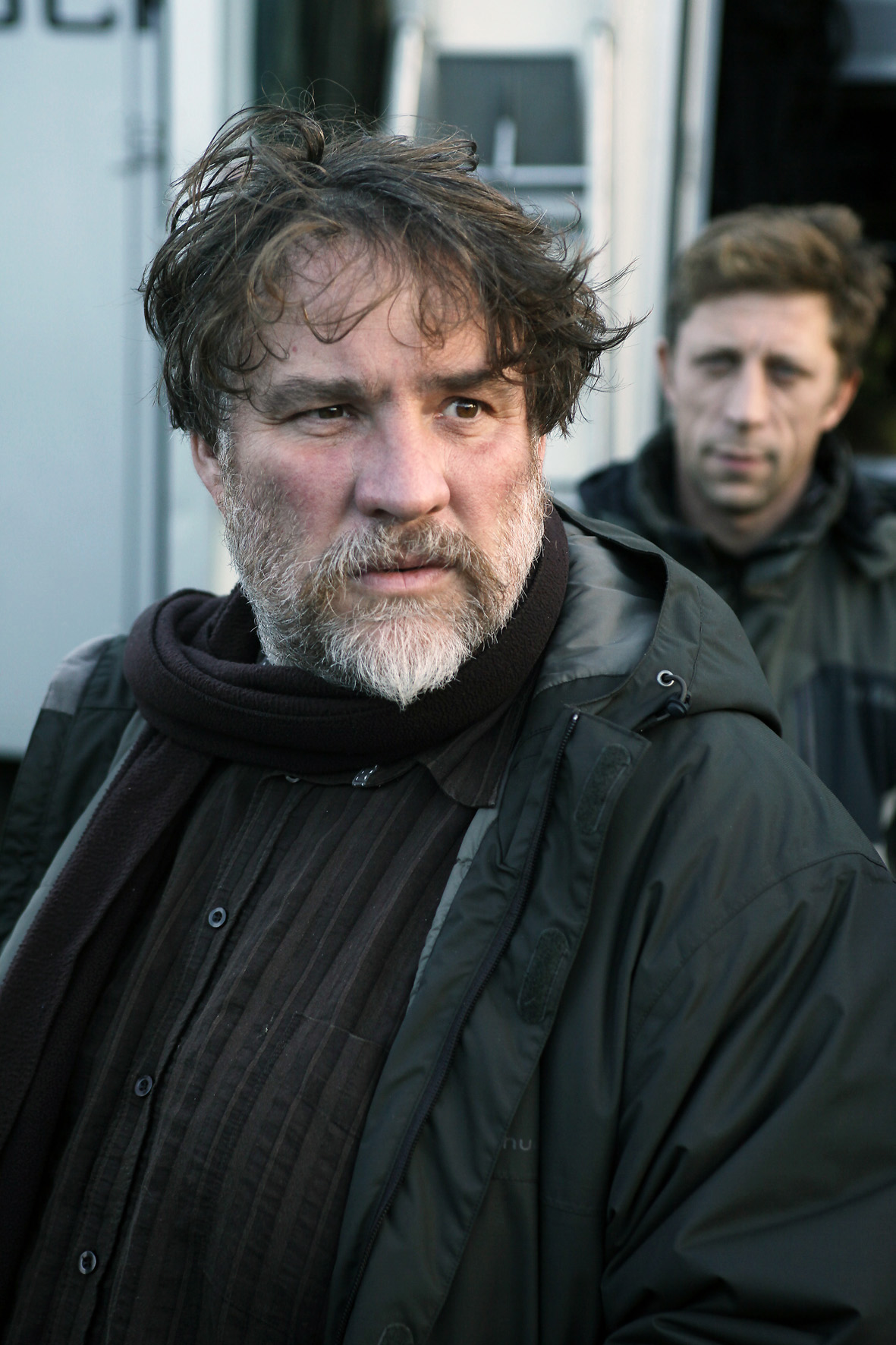 Bouli Lanners sur le tournage de son film "Les Géants" 2010